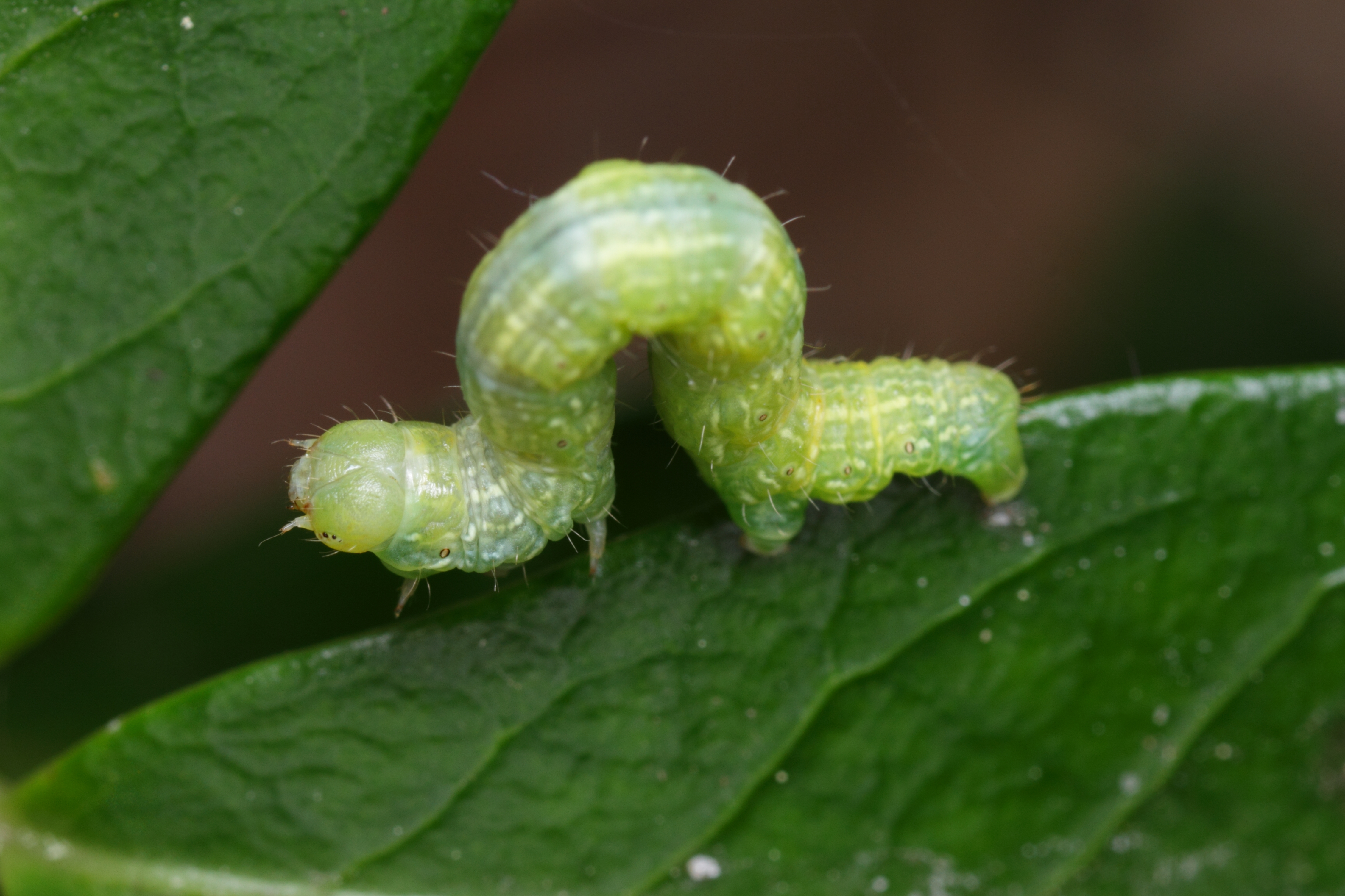 Raupe des Kleinen Frostspanners Operophtera brumata im Burgenland.